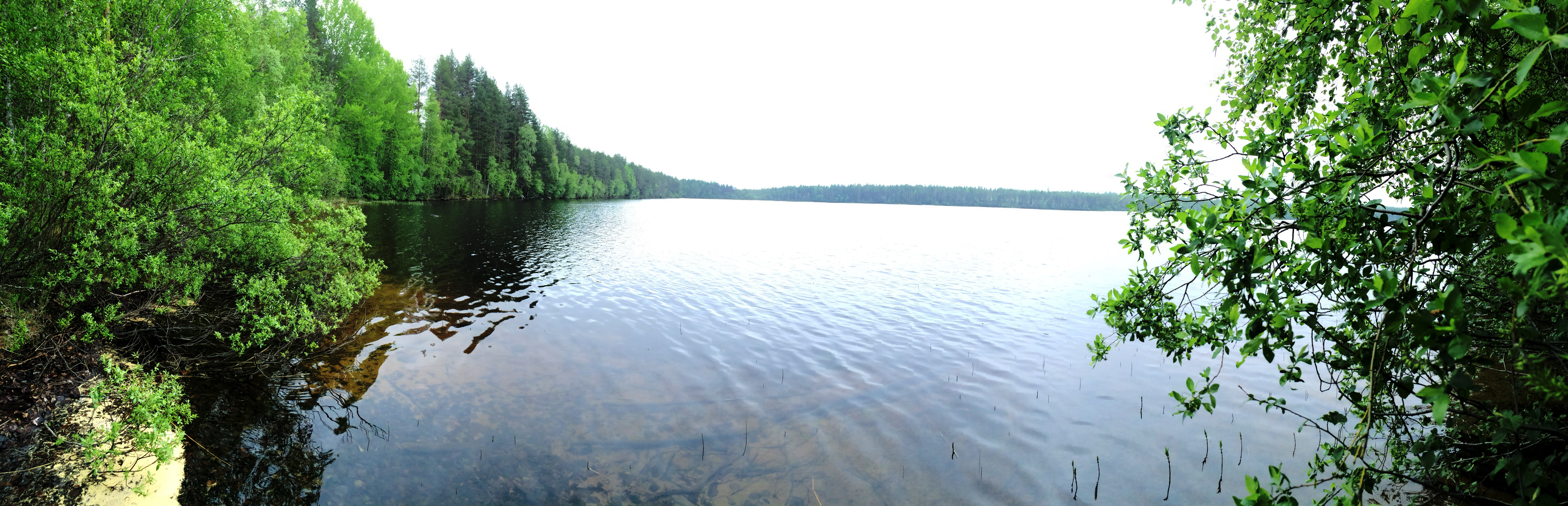 Торосярви